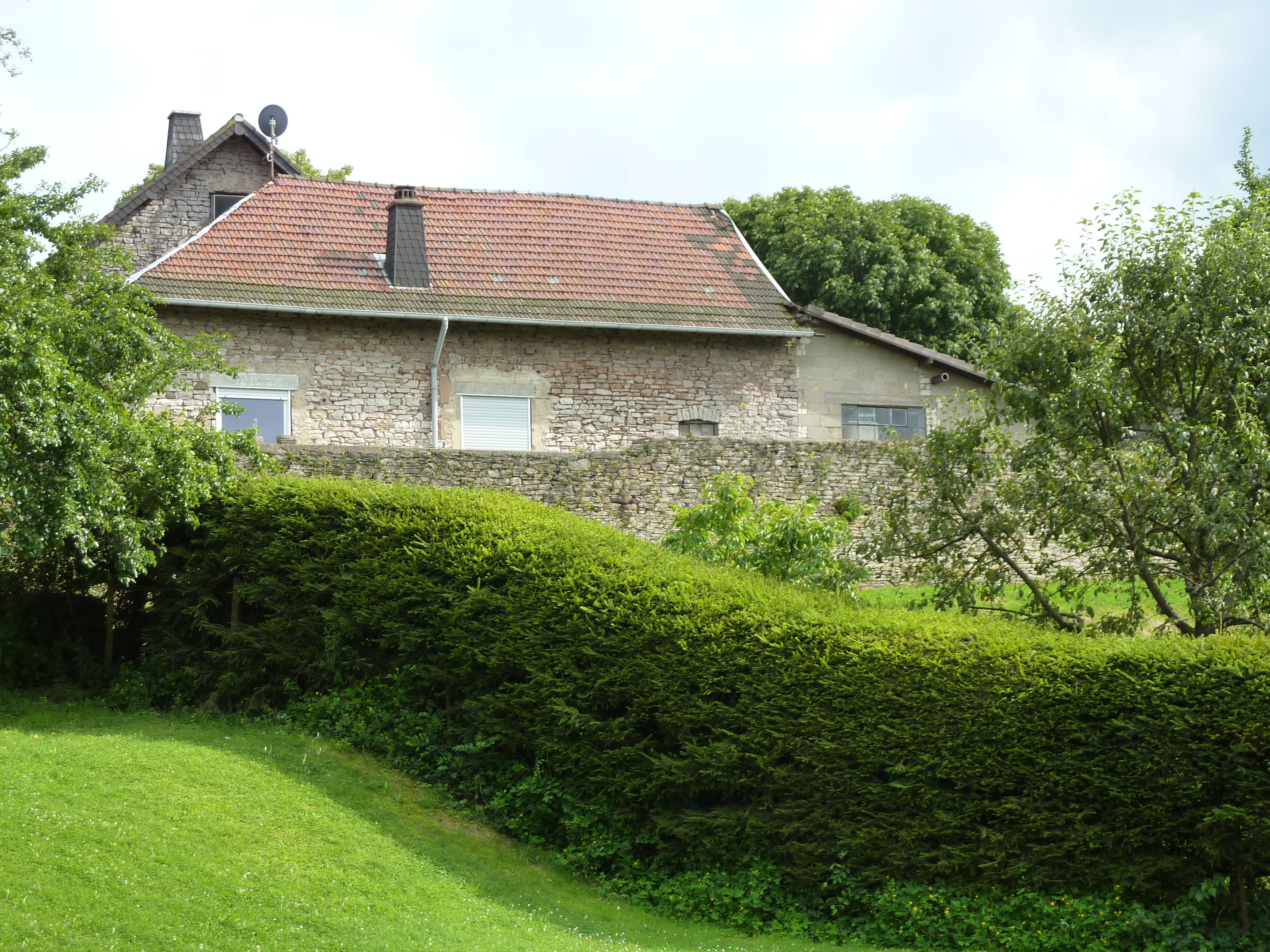 Rohr, Hochstr. 1; ehem. Burg 4, Umfassungsmauer